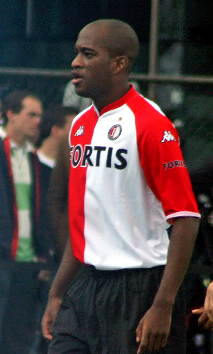 Dwight Tiendalli (Feyenoord)